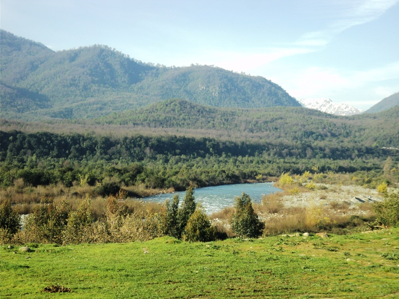 Curso del río Ancoa, en la precordillera de la Provincia de Linares (Chile)